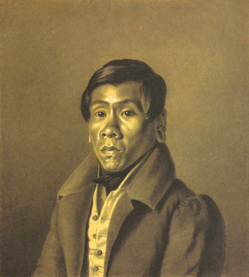 Der Botokude-Indianer Joachim Quäck (Quäck = portugiesisch: Kuêk, ursprünglich: Nuguäck) (* vermutlich um 1800 im brasilianischen Bundesstaat Minas Gerais in Brasilien; † 1. Juni 1834 in Neuwied) traf 1817 als Minderjähriger den deutschen Entdecker, Ethnologen, Zoologen und Naturforscher Prinz Maximilian zu Wied-Neuwied in Brasilien. Quäck wurde für Maximilian zum einheimischen Reisebegleiter, der ihm das für seine Forschungen notwendige Hintergrundwissen vermittelte. Maximilian ließ ihn nach Europa nachkommen. Am 12. Februar 1818 kam Quäck in Neuwied an. Dort arbeitete er für Maximilian als dessen persönlicher Kammerdiener. Quäck verstarb im Alter von 34 Jahren am 1. Juni 1834 um 9 Uhr morgens an einer Leberentzündung und wurde am 3. Juni 1834 (vermutlich auf dem Alten Friedhof von Neuwied) katholisch beerdigt.